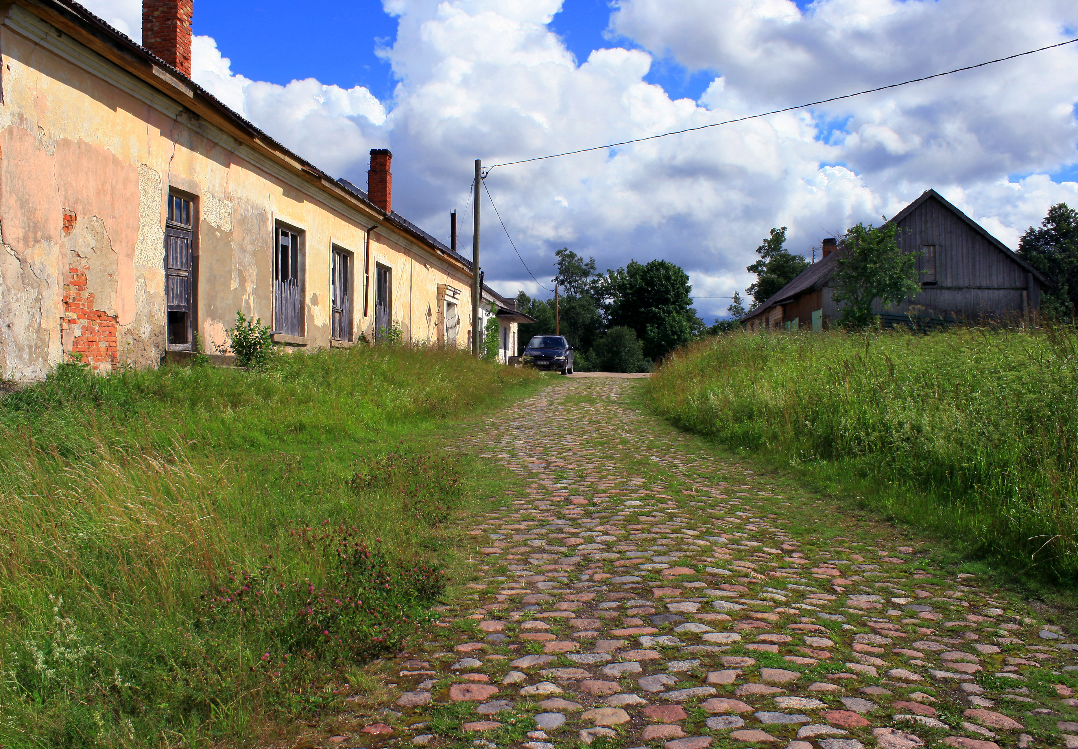 Old roadway in Saka